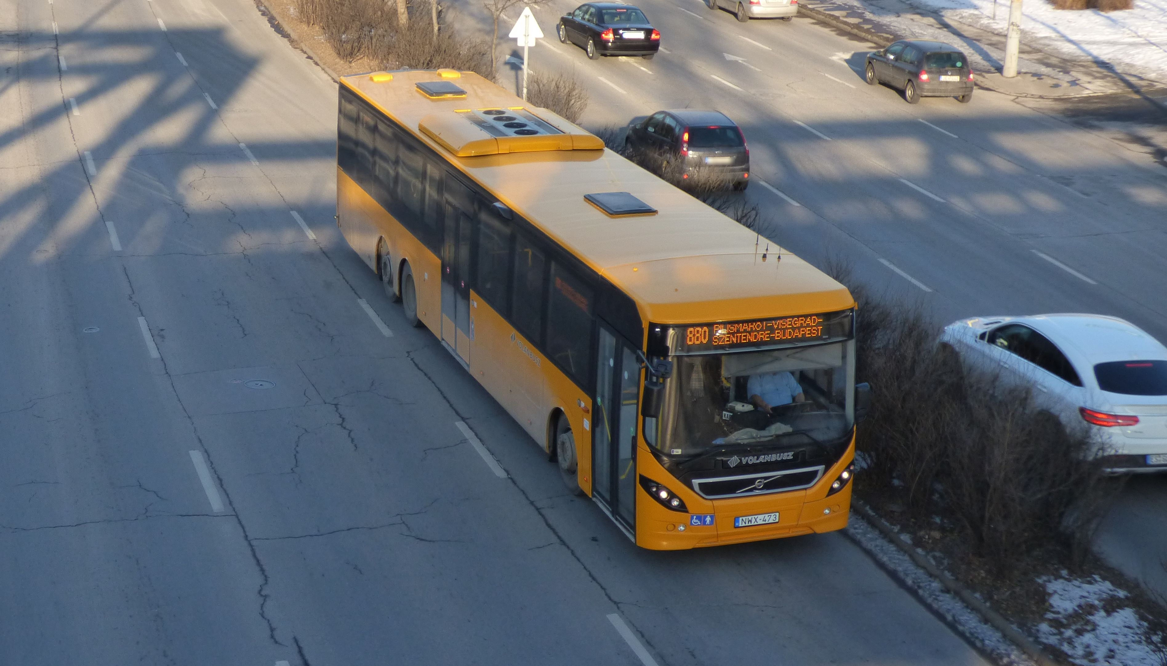 880-as jelzésű Volvo 8900-as busz Újpesten